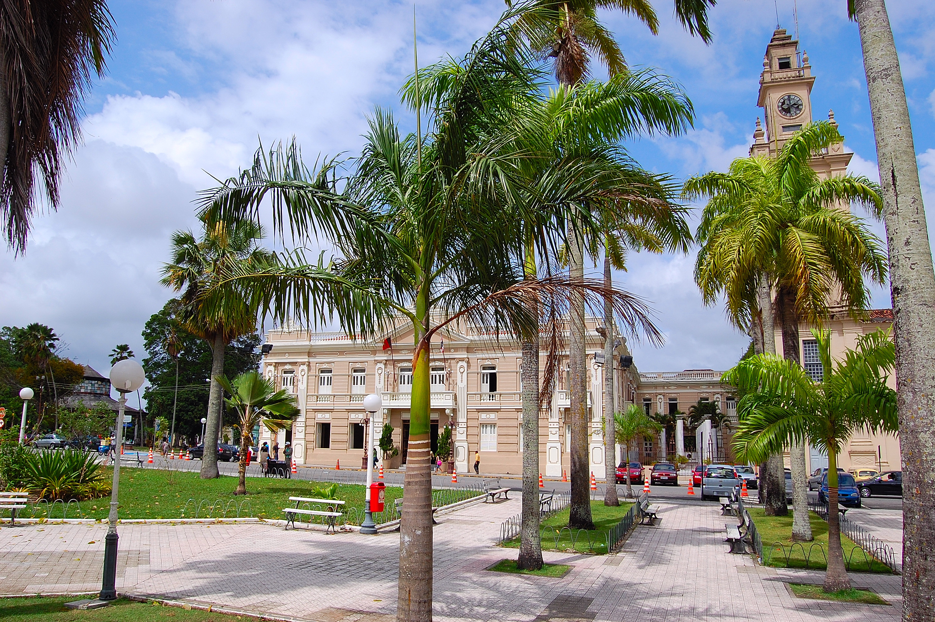 Sede do Centro de Ciências Jurídicas da UFPB - João Pessoa - Paraíba - Brasil